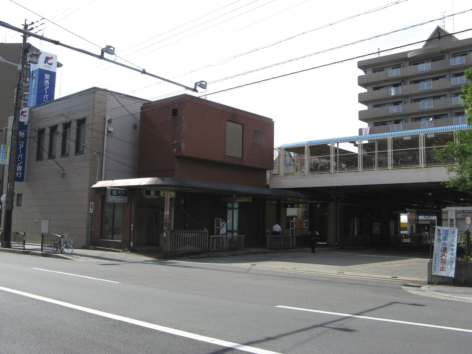 北巽駅1号出入口（中央）と北巽バスターミナル